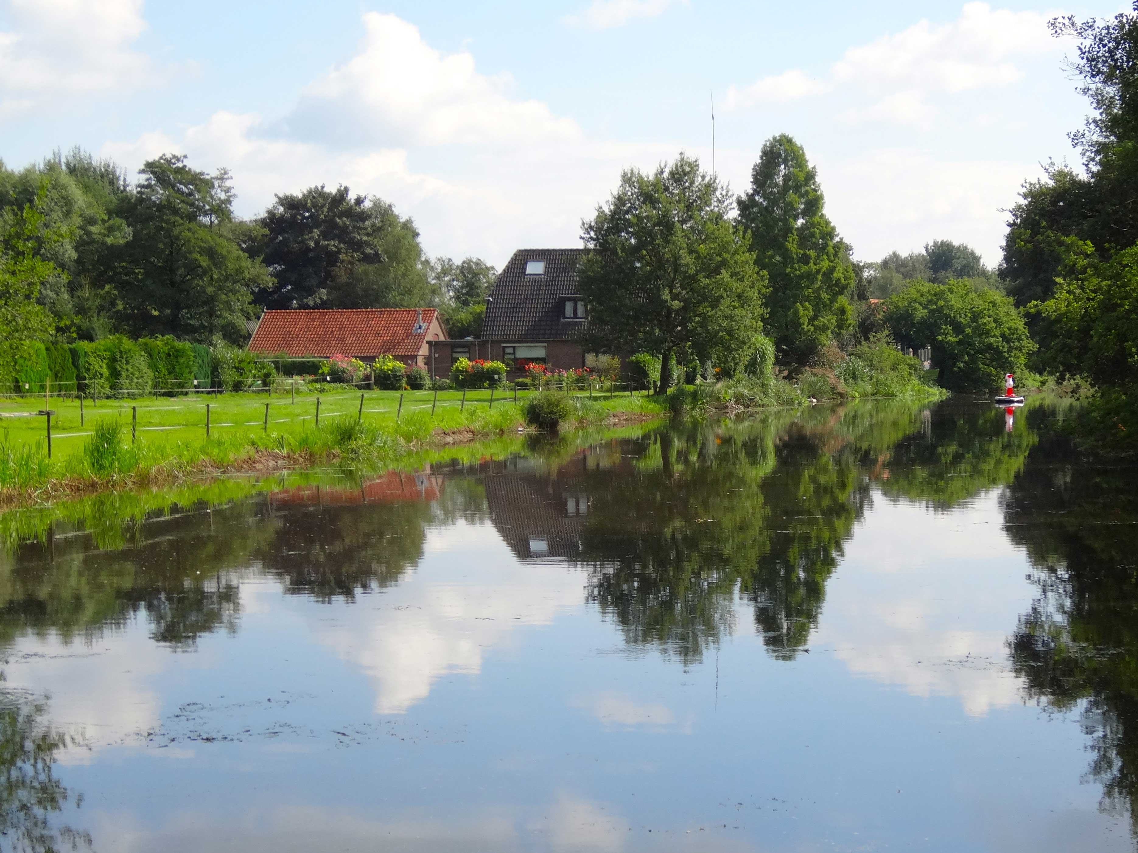 Het Overijssels Kanaal ter hoogte van Egede